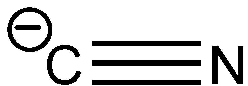 Struktur des Cyanidions